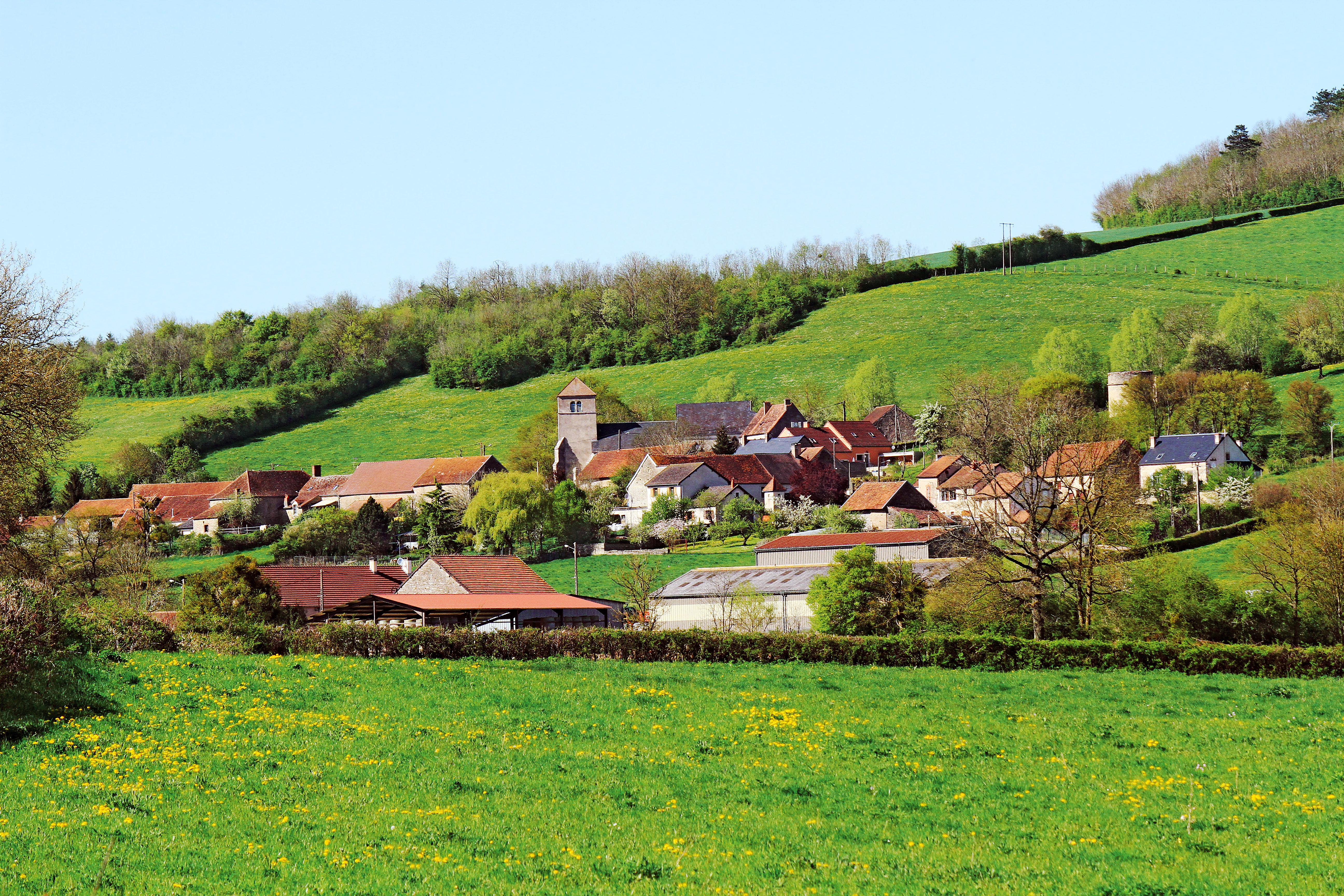 Fontangy sur le flanc du Mont Ligot